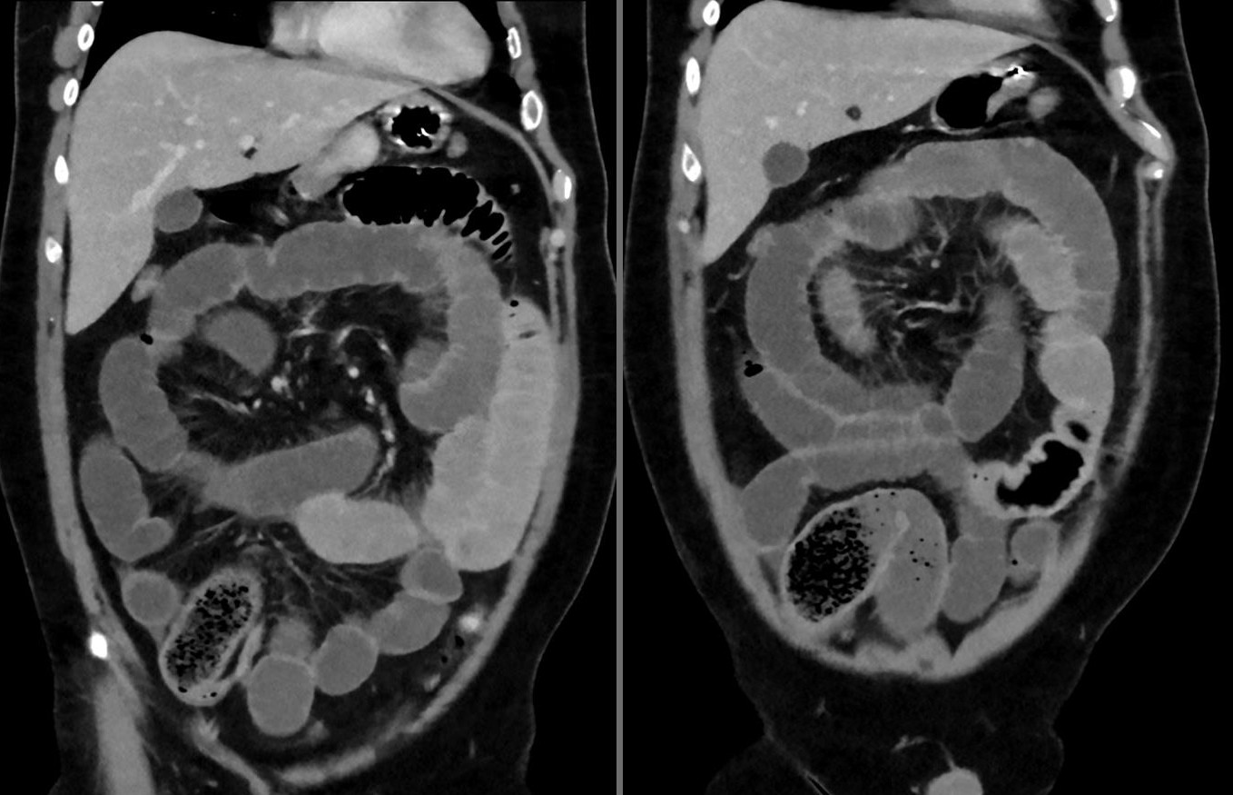 Dünndarmileus bei einem jungen Mann nach offenbar übermäßigem Essen von Chia-Samen. Computertomographie 2 Schichten koronar. Man erkennt den akkumulierten Bolus im unteren Dünndarm, den nachfolgenden Hungerdarm und die dilatierten, vorgeschalteten Schlingen.